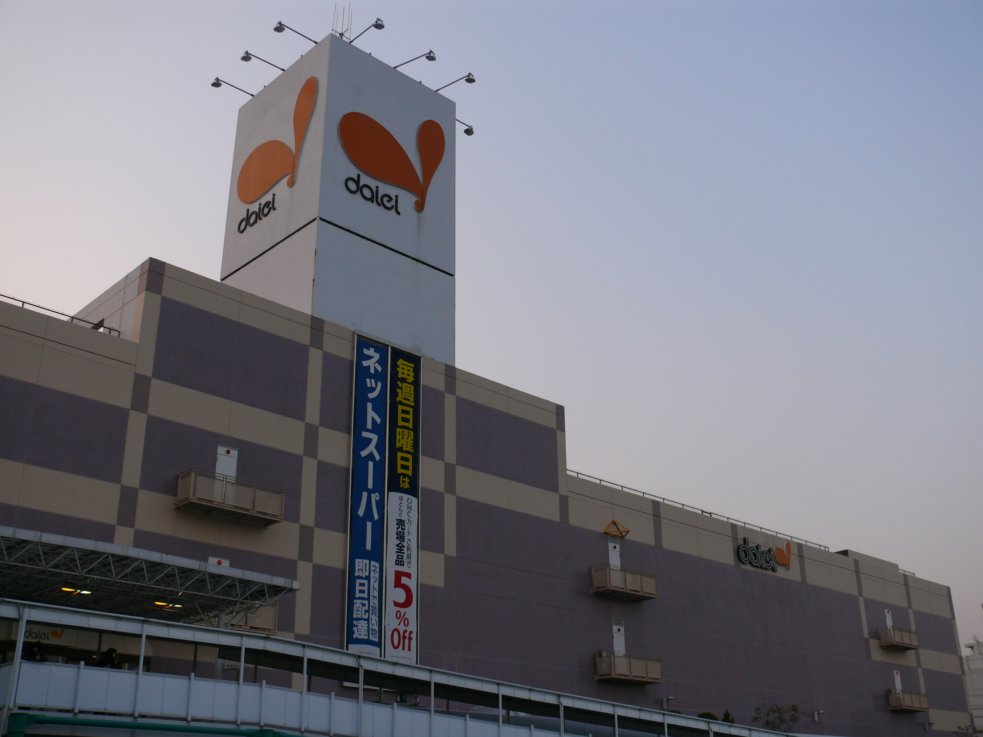 ダイエー市川コルトンプラザ